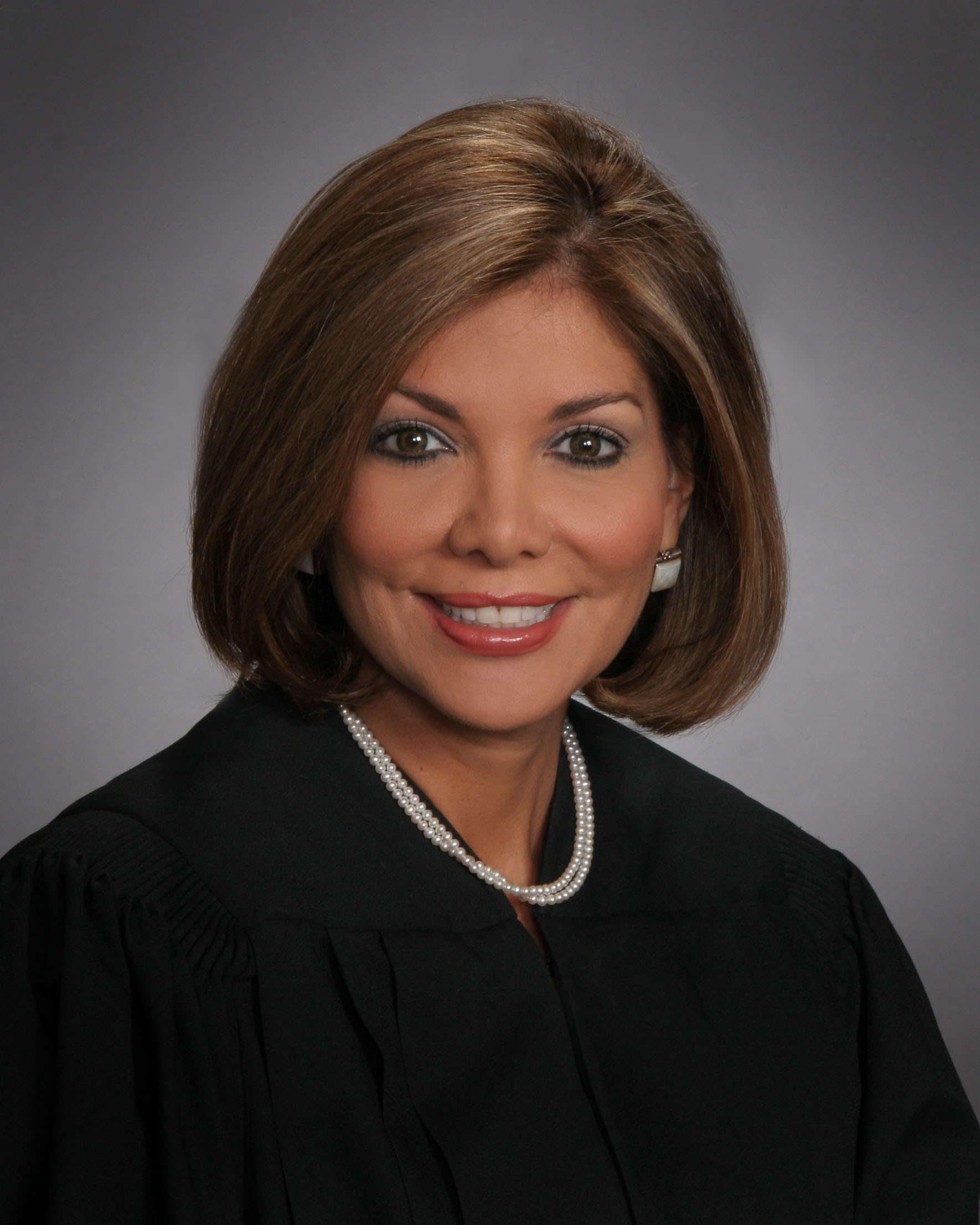 Judge Eva Guzman